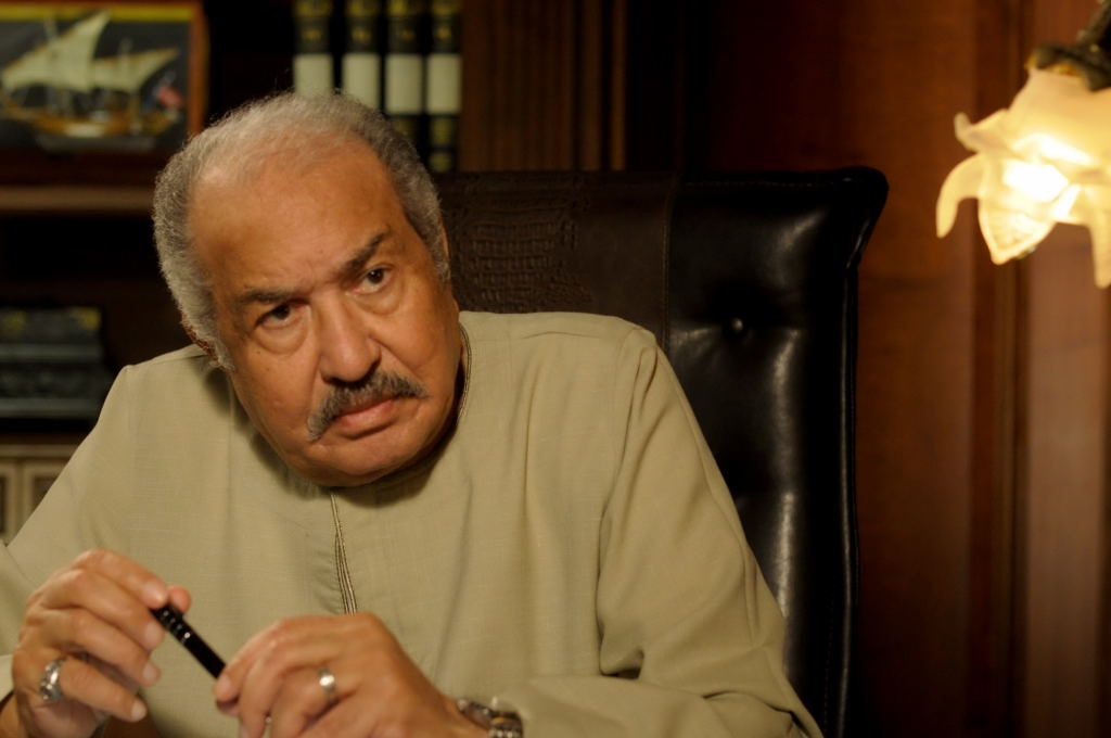 الفنان حمدي احمد من مسلسل في غمضة عين